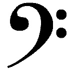 Fa klabea